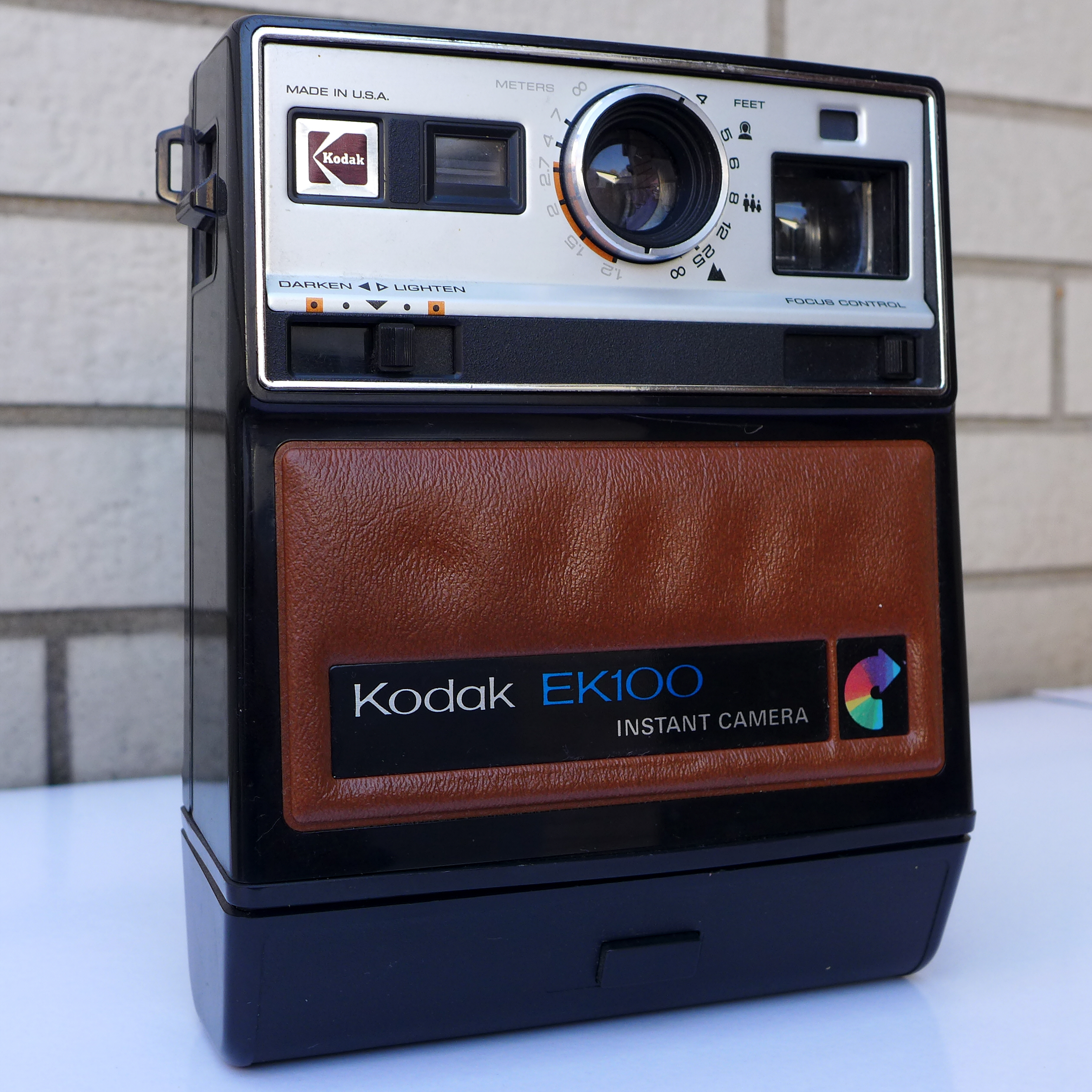 Sofortbildkamera (Instant Camera) Kodak EK100 etwa aus dem Jahre 1977. Produziert für den europäischen Markt, bauähnlich mit Kodak EK6. Film: Kodak PR10 Instant, Verschluss: Electronic 1/20-1/300 sec., Optik: Manual focus 3-element 137mm f/11.